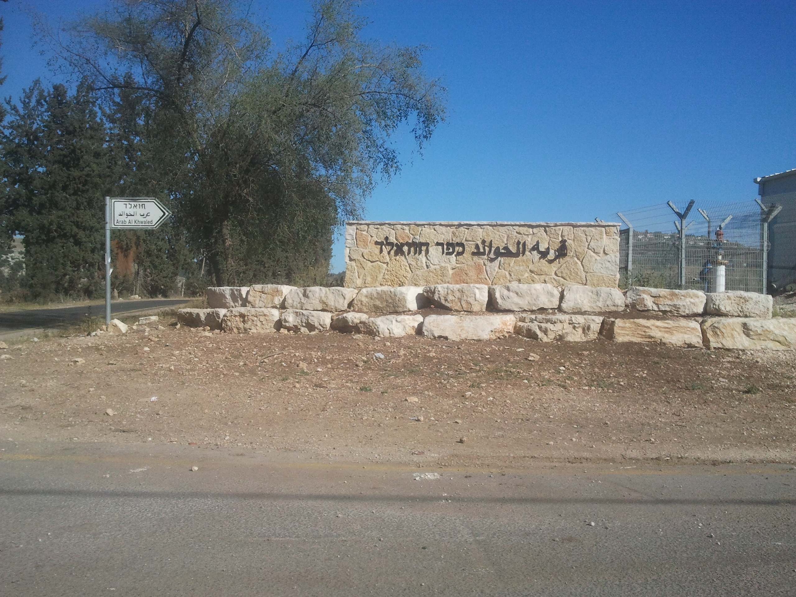 ח'וואלד הוא ישוב כפרי ערבי-בדואי בצפון מדינת ישראל. בנחל ציפורי